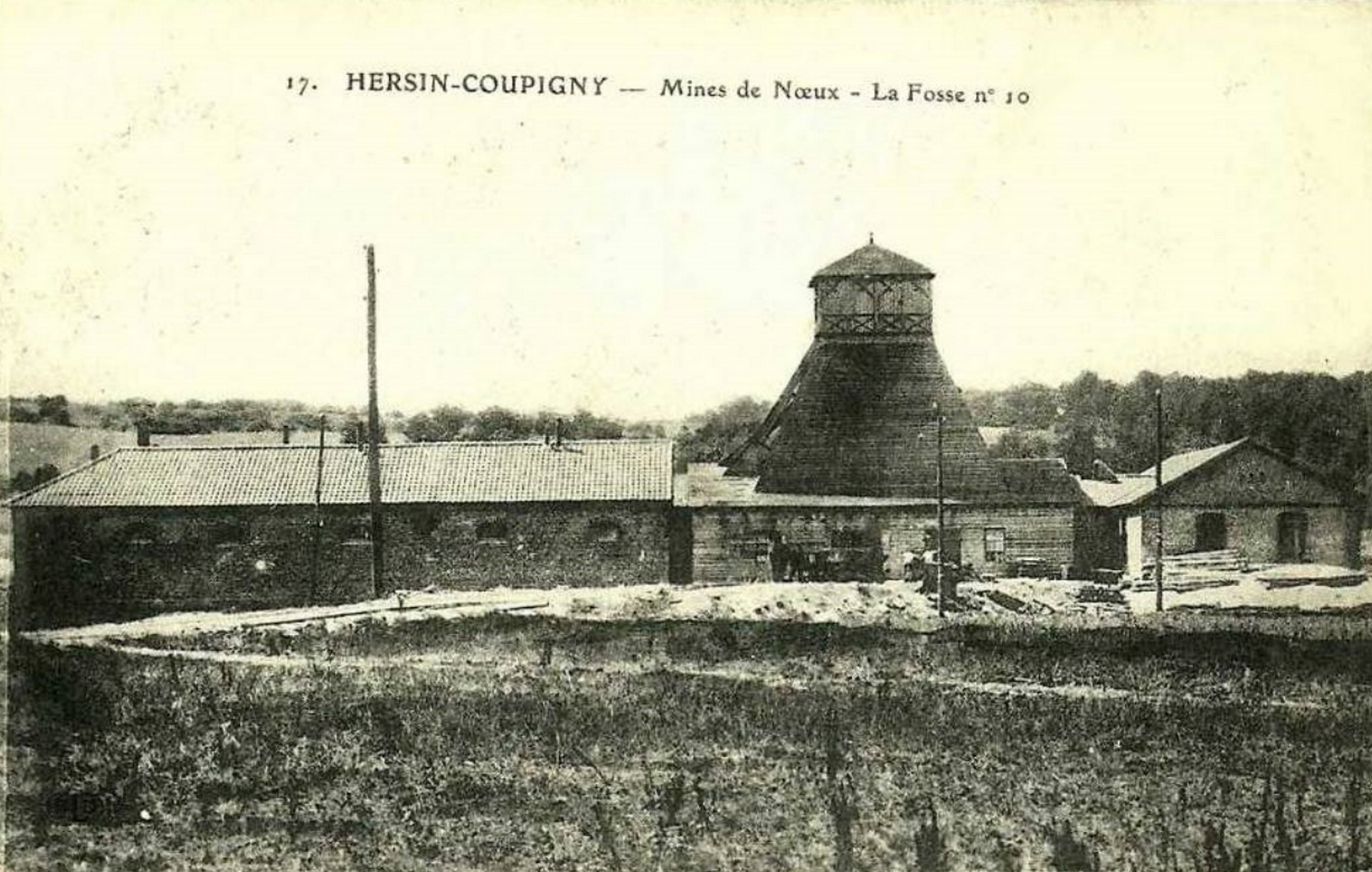 La Fosse n° 10 de la Compagnie des mines de Nœux était un charbonnage constitué d'un seul puits situé à Hersin-Coupigny, Pas-de-Calais, Nord-Pas-de-Calais, France.